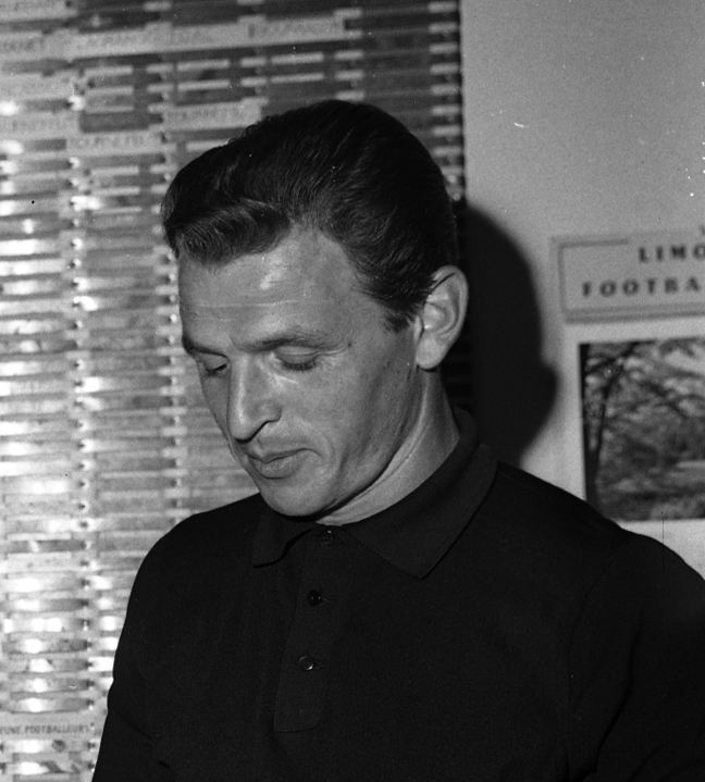 26 septembre 1961. René Pleimelding (entraîneur du Toulouse Football Club) et Jacques Foix (joueur du TFC). Plan taille sur les deux hommes en train de se serrer la main ; Jacques Foix rejoint l'effectif du TFC pour cette saison.